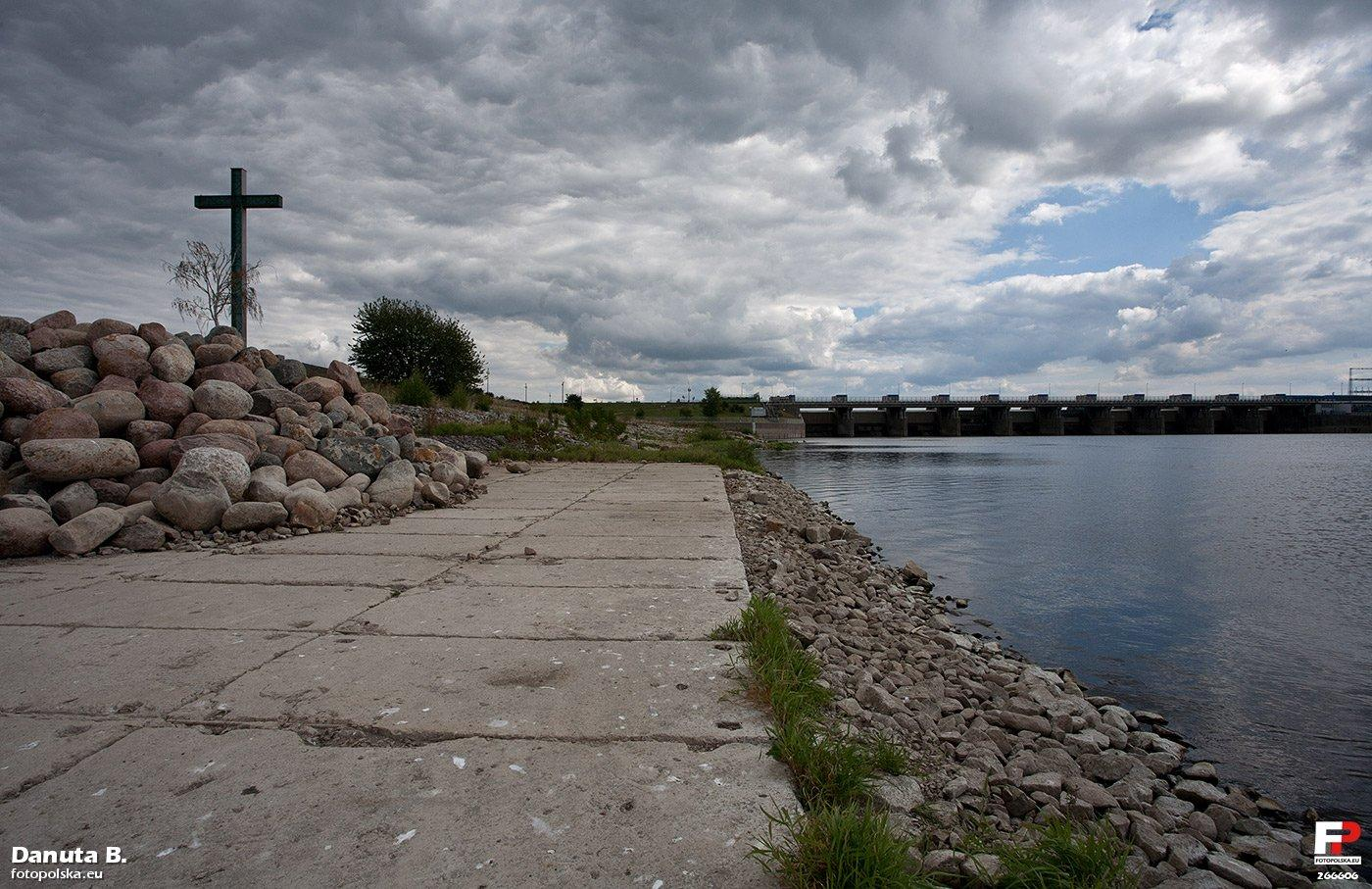 Zapora czołowa - jeden z elementów stopnia wodnego we Włocławku. Wał usypany z piasku po północnej stronie jazu (tak sądzę). Długość 650 m, szerokość w koronie 13 m. Jednak są miejsca szersze. Ustawiono tam krzyż - pomnik ks. J. Popiełuszki, wg projektu Jerzego Kaliny i Andrzeja Krawczyka.